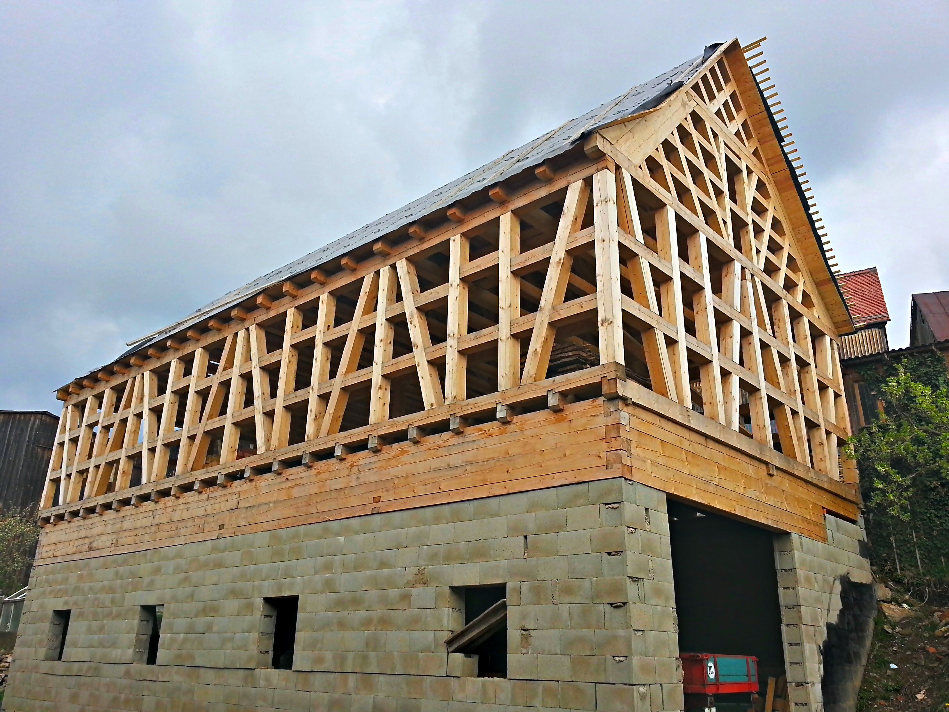 Rohbau eines Egerländer Fachwerkhauses in Neualbenreuth, Landkreis Tirschenreuth in der nördlichen Oberpfalz (Mai 2013), hinter dem Rathaus